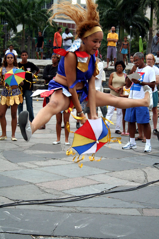 Olinda, Brazil